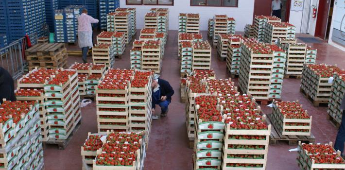 Plateau de la criée de Wépion